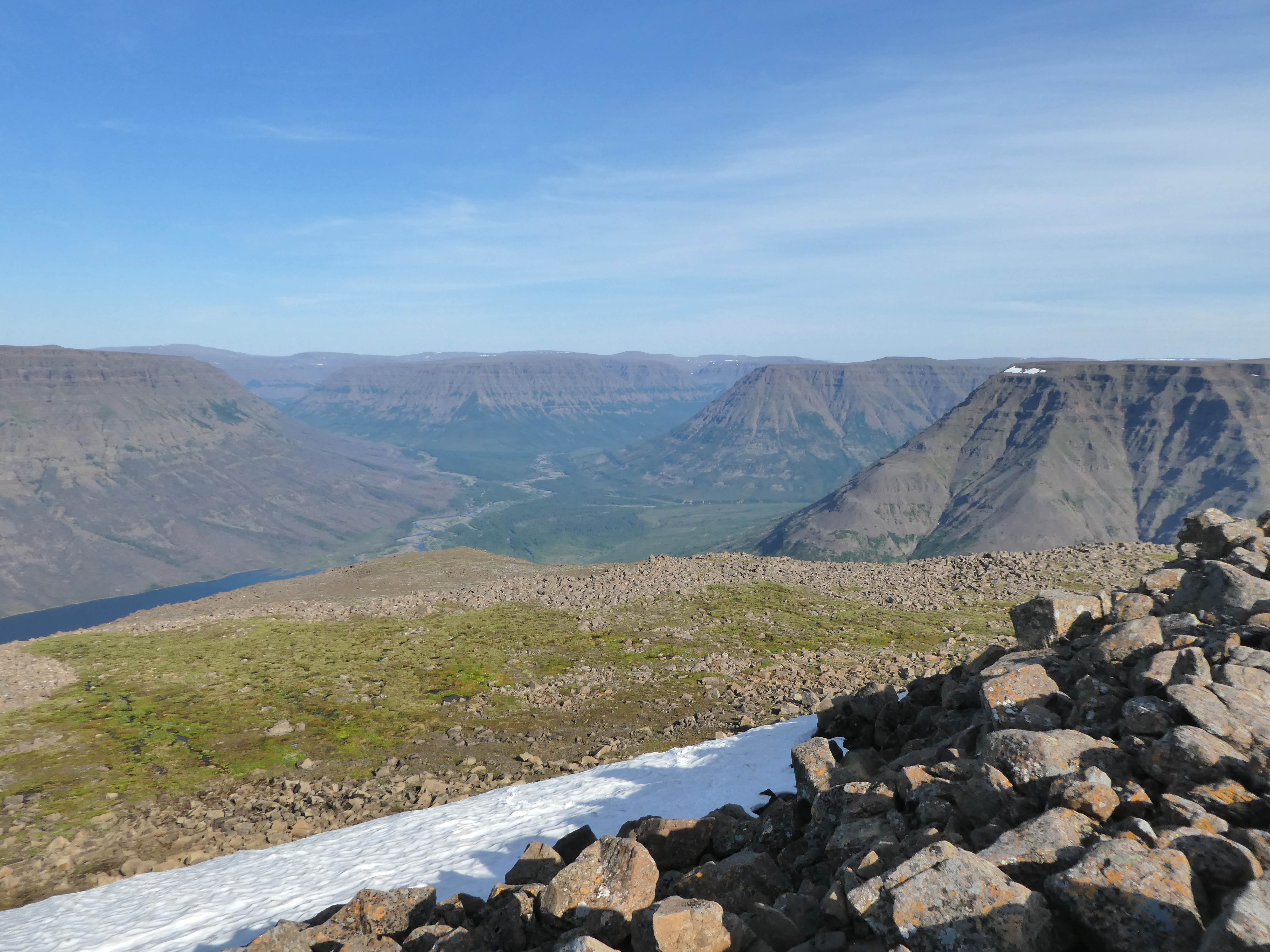 Плато Путорана в районе озера Лама